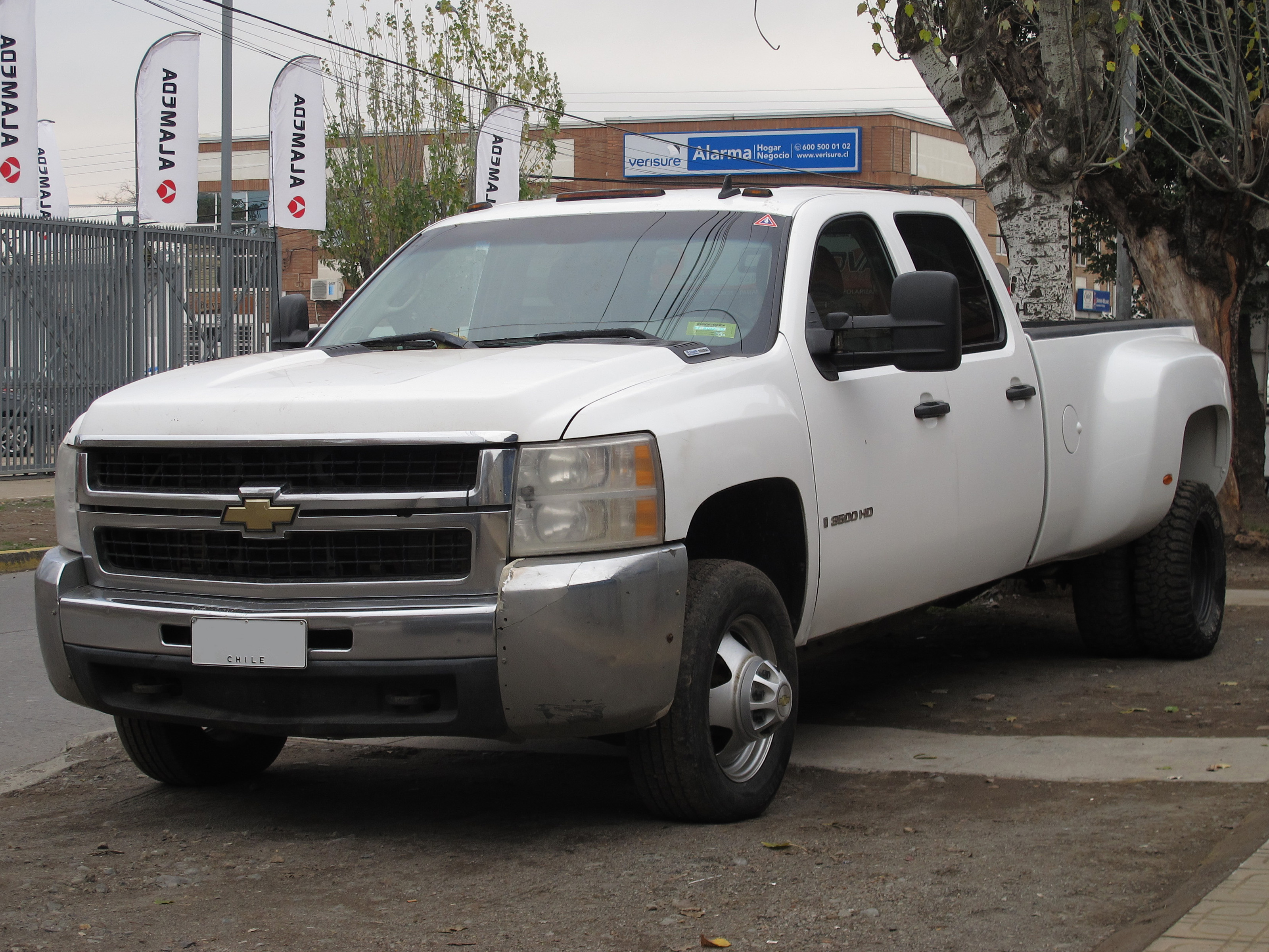 Chevrolet 3500 HD Silverado Dual 4x4 2008